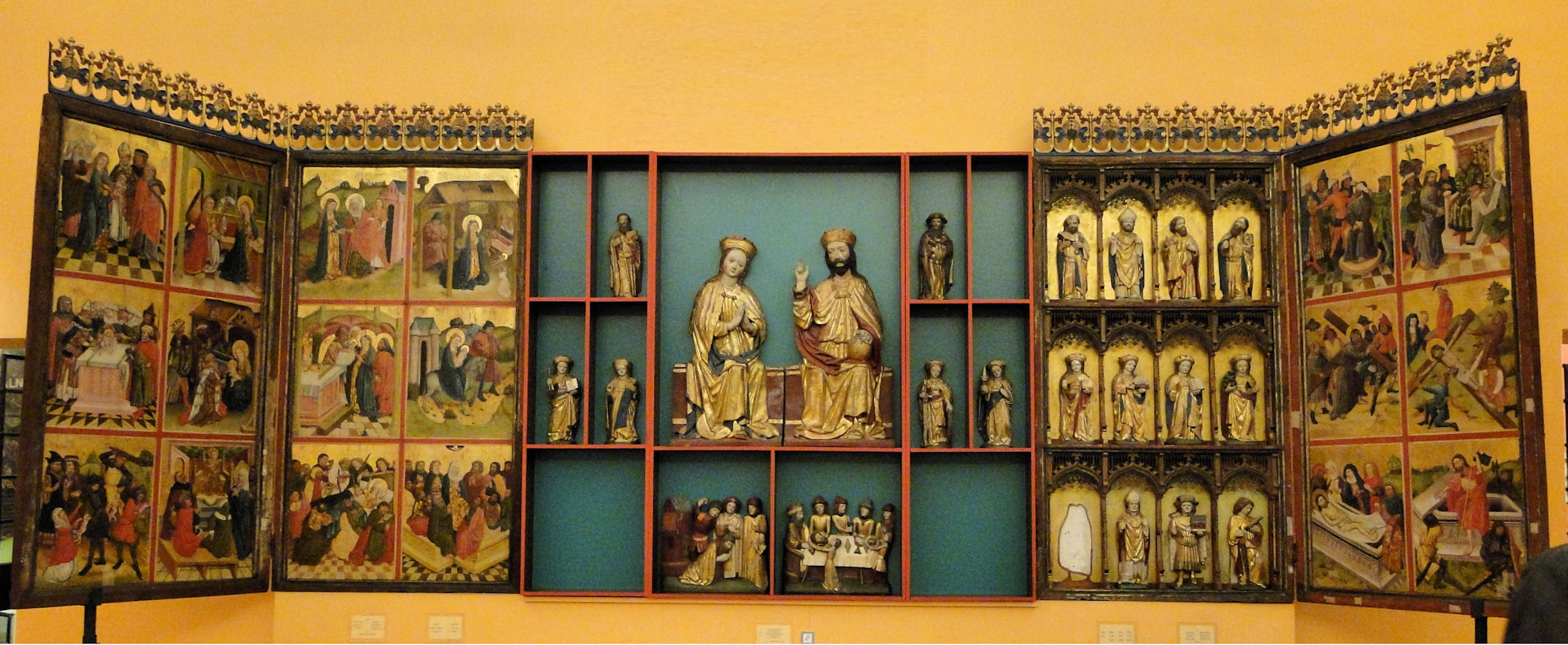 Dawny ołtarz główny z kościoła św. Jana w Stargardzie Szczecińskim. Obecnie eksponowany w Muzeum Narodowym w Szczecinie.